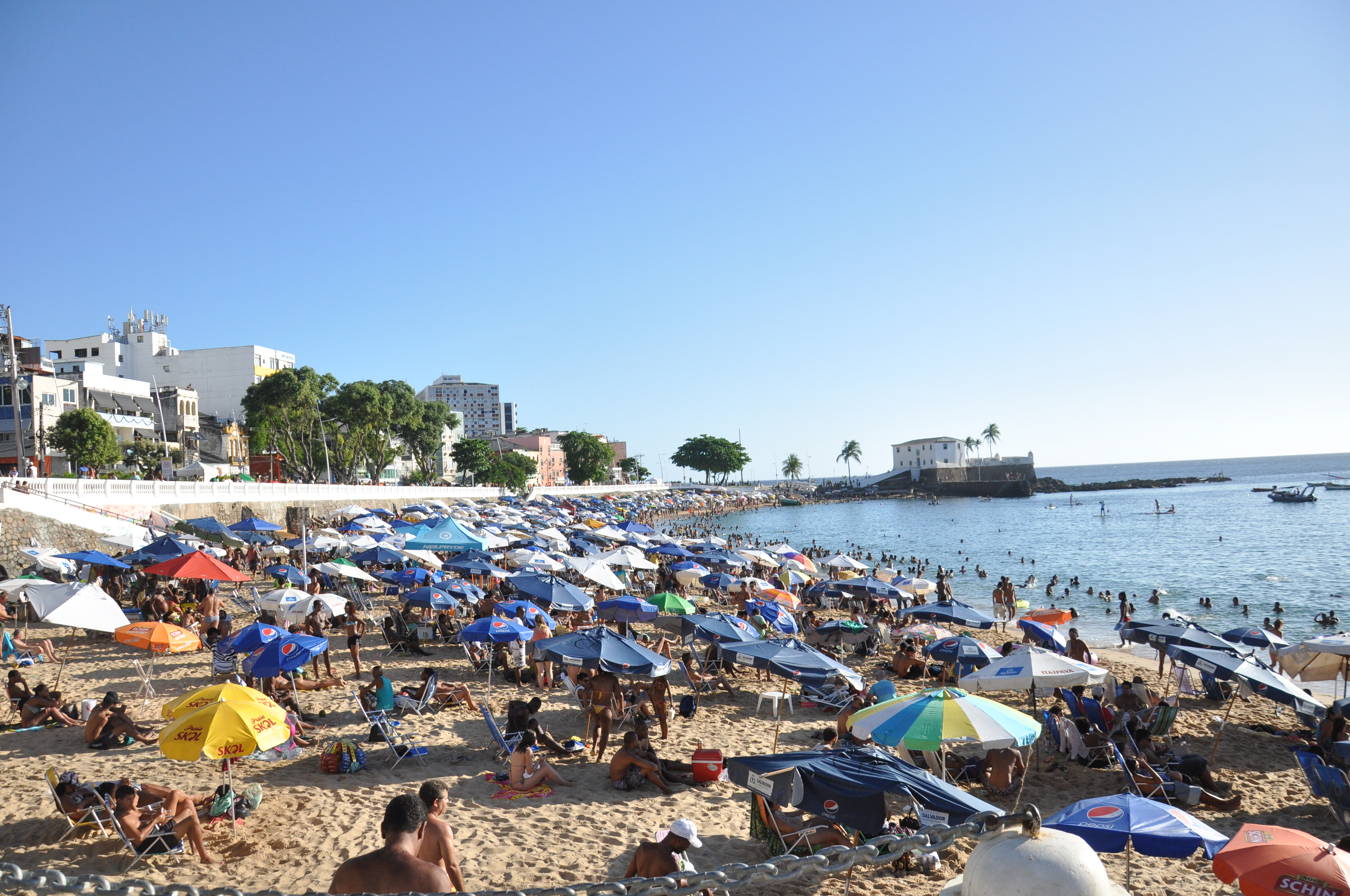 Praia do Porto da Barra Foto - Tereza Torres